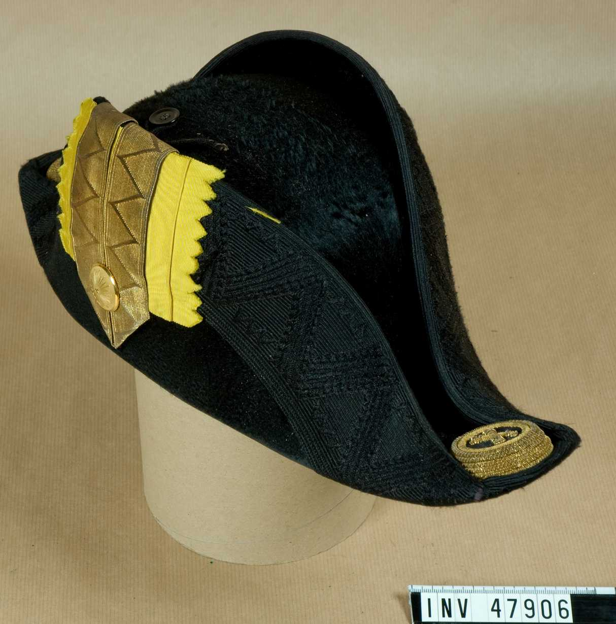 Hatt m/1854-59 för överste vid Fortifikationen. Armémuseums identifikationsnr: AM.047906